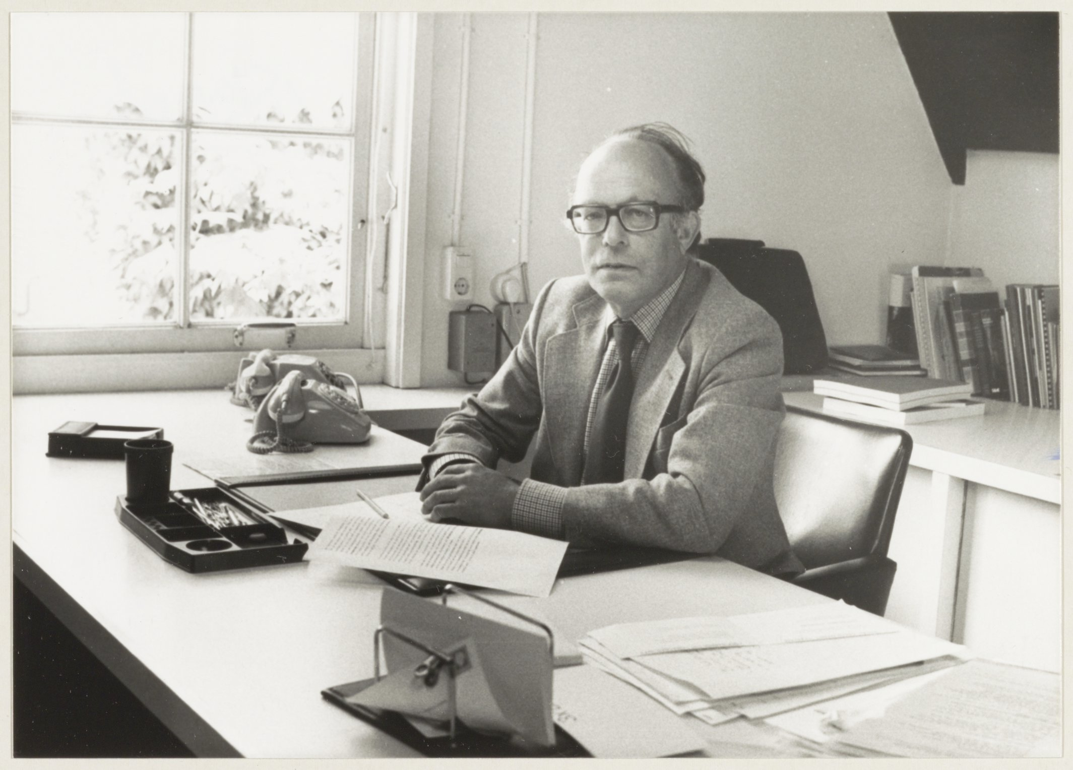 CollectieCollectie Fotoburo de BoerInventarisnummerNL-HlmNHA_54010419NL-HlmNHA_1478_18320KBeschrijvingDick Couvée, directeur van het Frans Halsmuseum.FotonummerNL-HlmNHA_1478_3183DocumenttypePortrettenVervaardigerBoer, Cees de (1918-1985) Soort vervaardigerFotograaf Interieur/ExterieurInterieurAnnotatiesHD090280PersonenCouvée, D. Functies personenMuseumdirecteur LandNederland ProvincieNoord-Holland GemeenteHaarlem PlaatsHaarlem StraatGroot Heiligland GeografischCentrum Begindatum1980Einddatum1980TechniekFoto TrefwoordenMusea